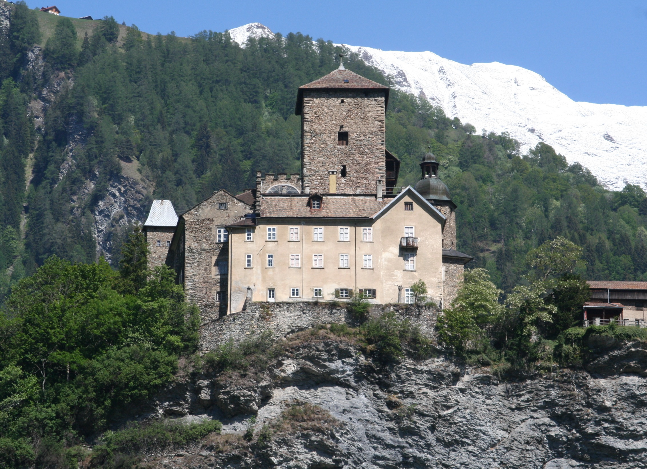 Schloss Ortenstein von Westen